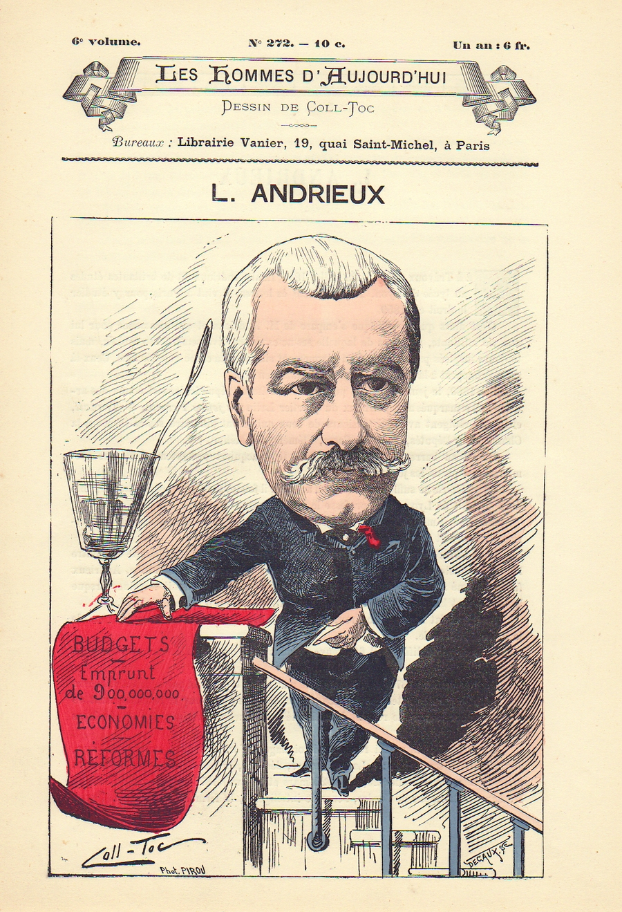 Les Hommes d'aujourd'hui, n°272 (1886). Caricature de Louis Andrieux par Alexandre Coillignon dit Coll-Toc. Scan exemplaire personnel.